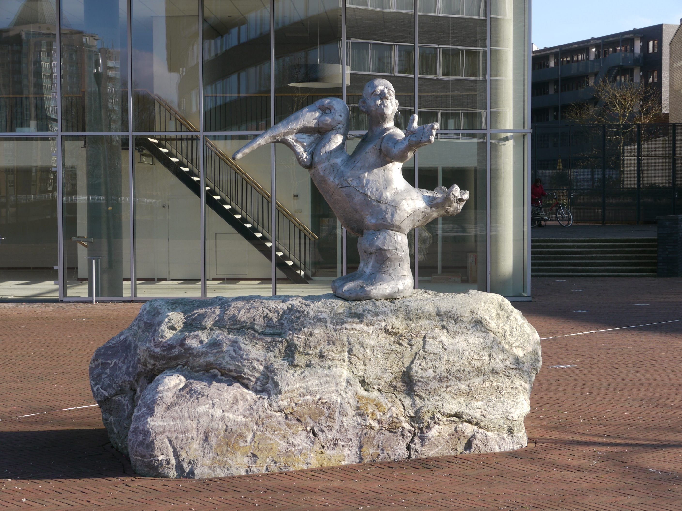 Beeld 'Kaka' van Erik Buys: Stenen beeld van vogelmens op pleintje op Stadskade in Apeldoorn.